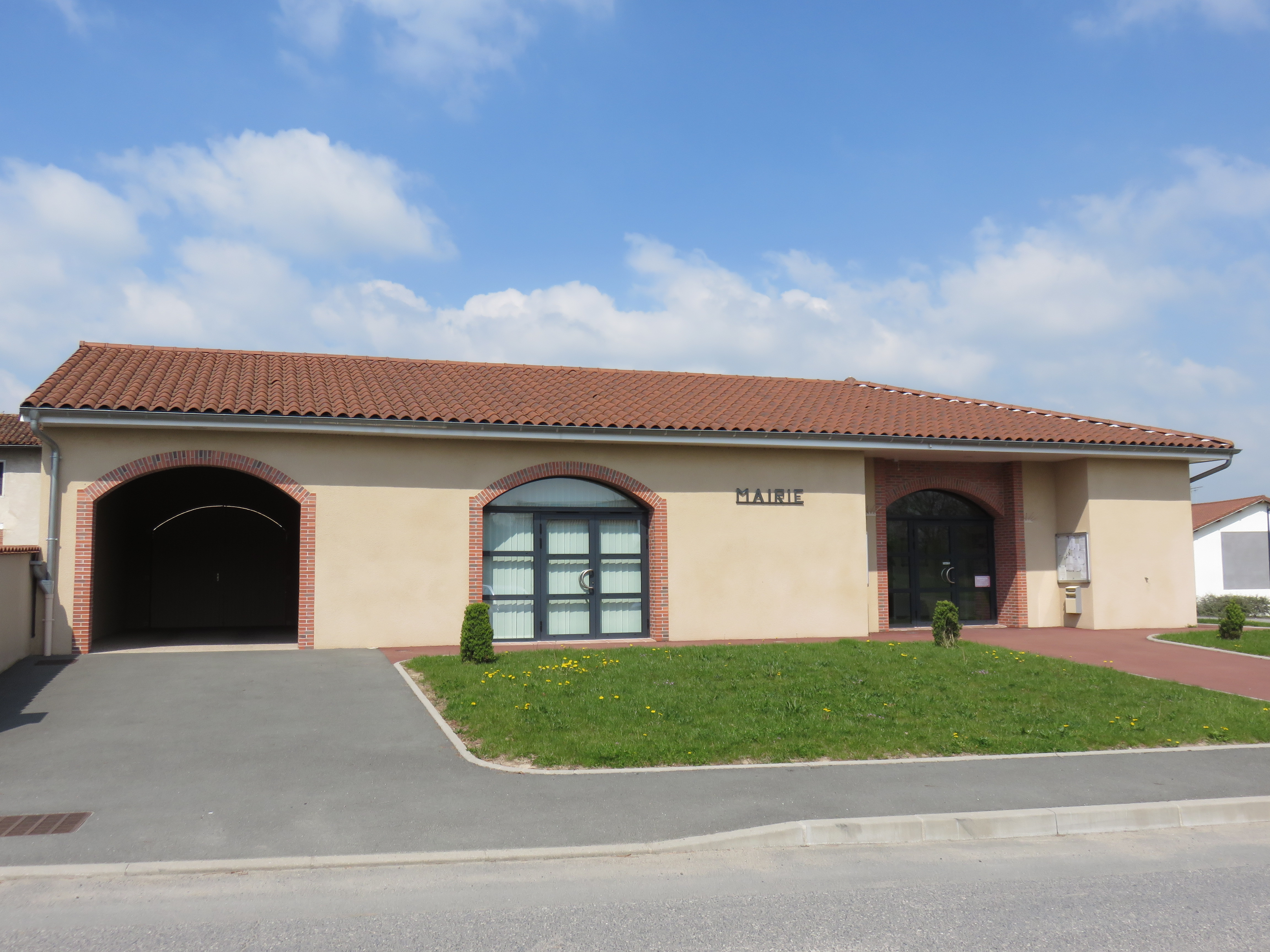 Mairie de Mizérieux (Loire, France).